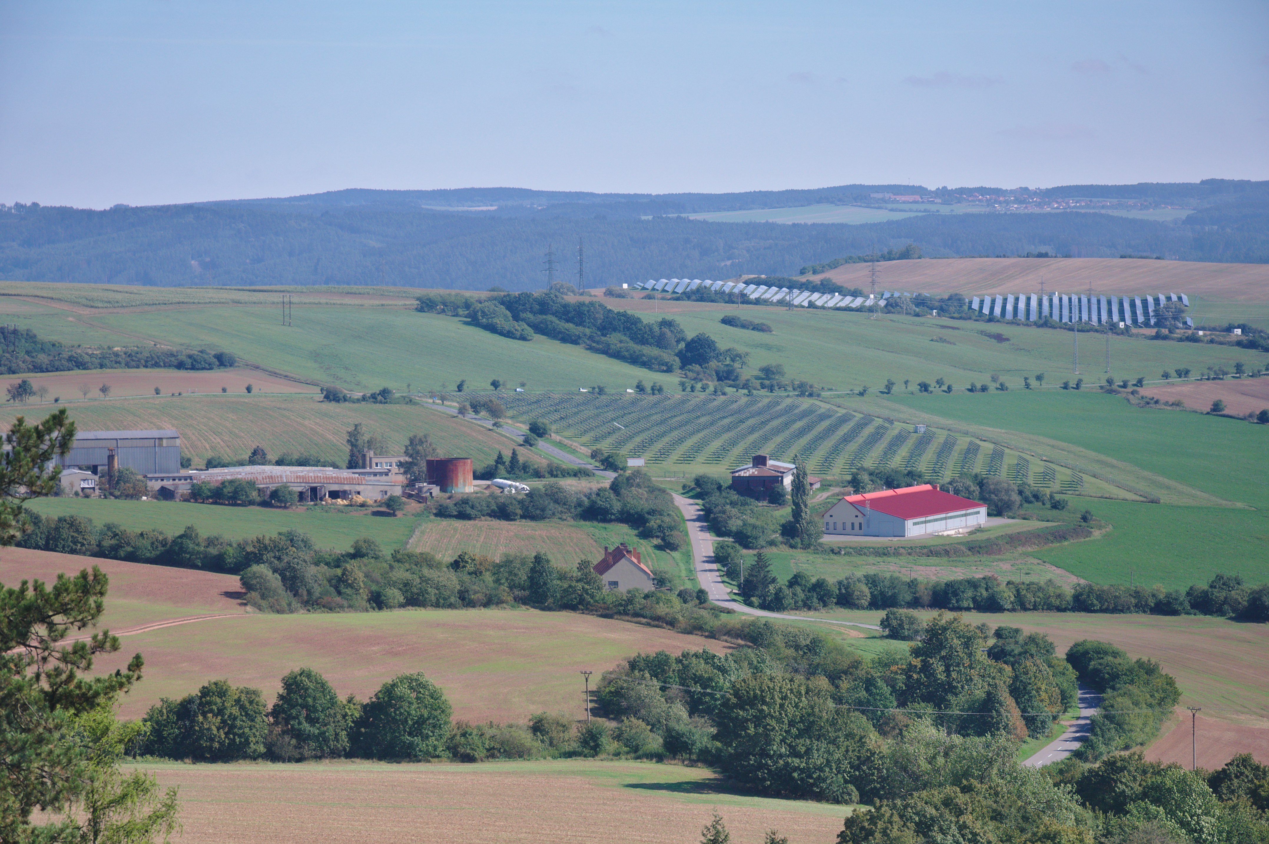 Výhled z hradiště na východ, Svitávka, okres Blansko